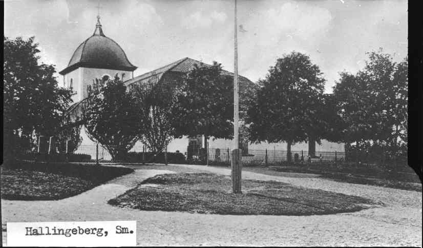 Kyrkan mot väster. Avfotograferat vykort. Kategori: (01) ExteriörerKyrkan mot väster. Avfotograferat vykort.